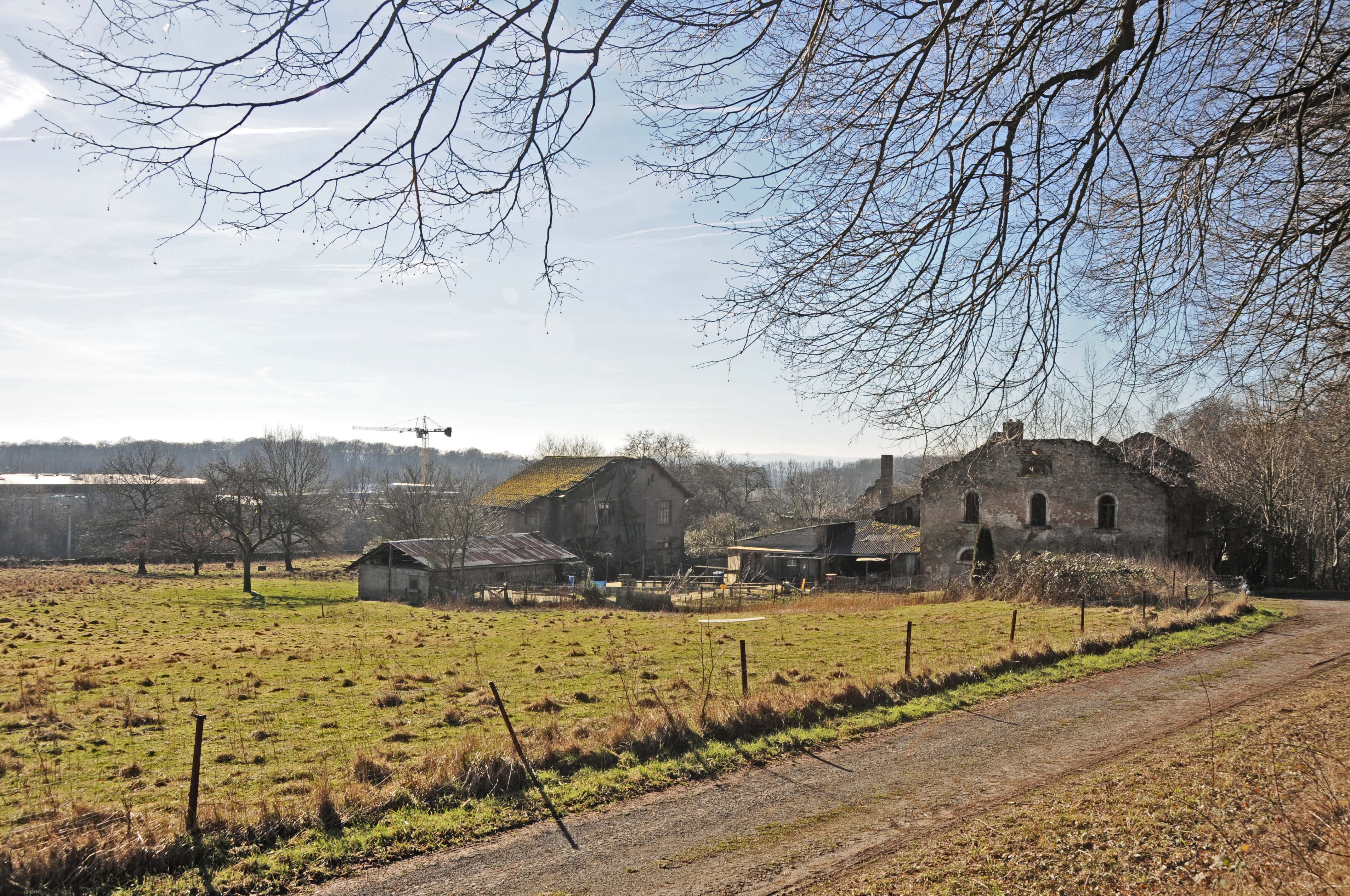 Scheedhaff.